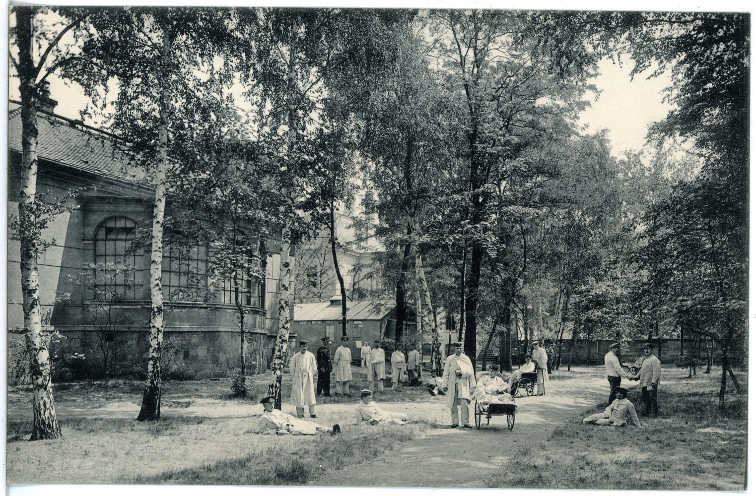 Dresden; Garnison-Lazarett (Reserve-Lazarett I) This postcard is from publisher Brück & Sohn in Meißen ( postcard has a unique number 19131 and is available in a higher resolution at the publisher. This images was uploaded in a cooperation project between Wikipedians and the publisher.